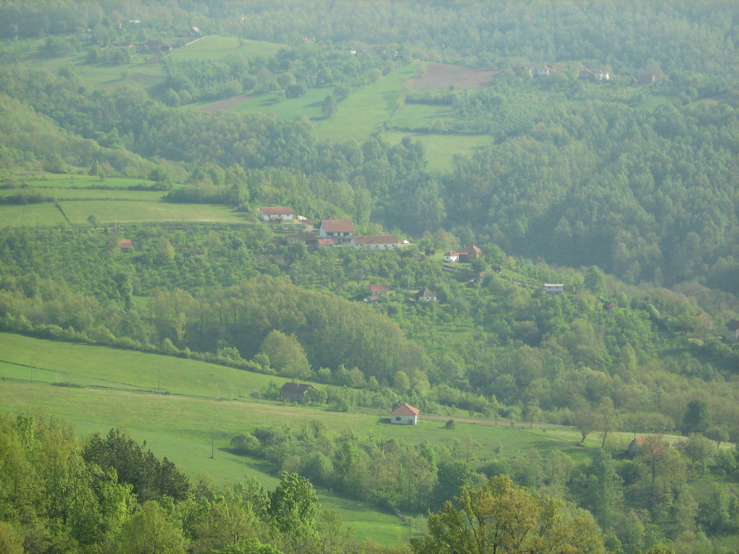 Поглед на Клик, куће Миловановића. Крвавац (555 m) је велико шумовито и разгранато брдо на јужној страни села Шарани, са узаном висоравни на врху брда. Сверозападна страна спушта се ка унутрашњем делу села, источна страна припада селу Семедраж, а јужна и југозападна страна спуштају се до леве обале реке Дичине.